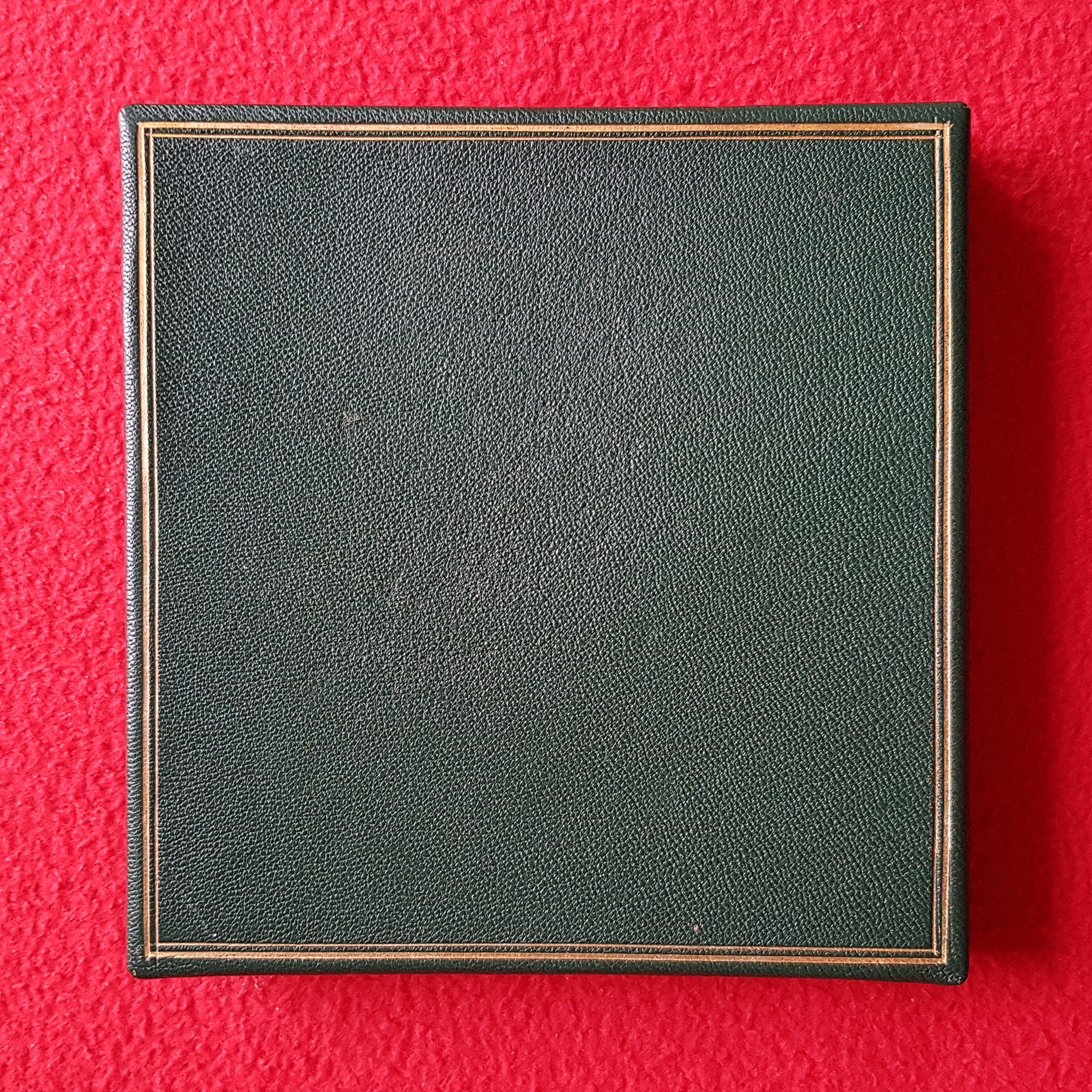 Die Silberne Verdienstplakette Darmstadt wurde mit einer Silbermünze und einer Urkunde verliehen. Hier Schatulle für die silberne Plakette für Prof. Dr. Hans-Gerhard Evers, 1965